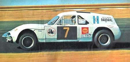 Prototipo Liebre Mk II Torino de Turismo Carretera. Piloto: Eduardo Copello